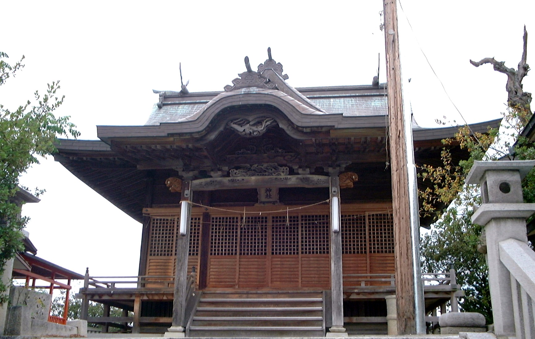 津島神社本殿